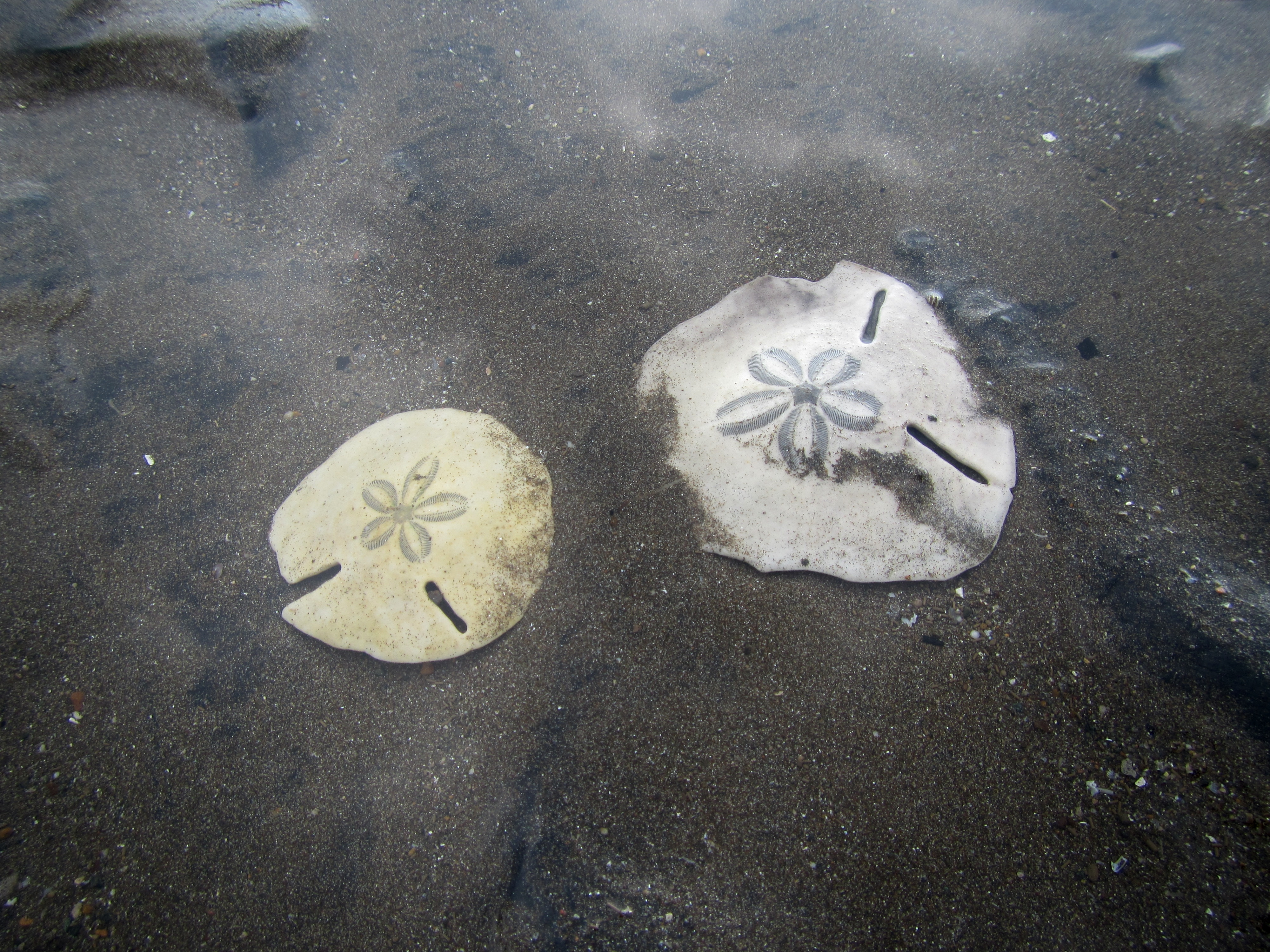 Oursins plats Echinodiscus bisperforatus sur la plage de Bambo Ouest, à Mayotte.